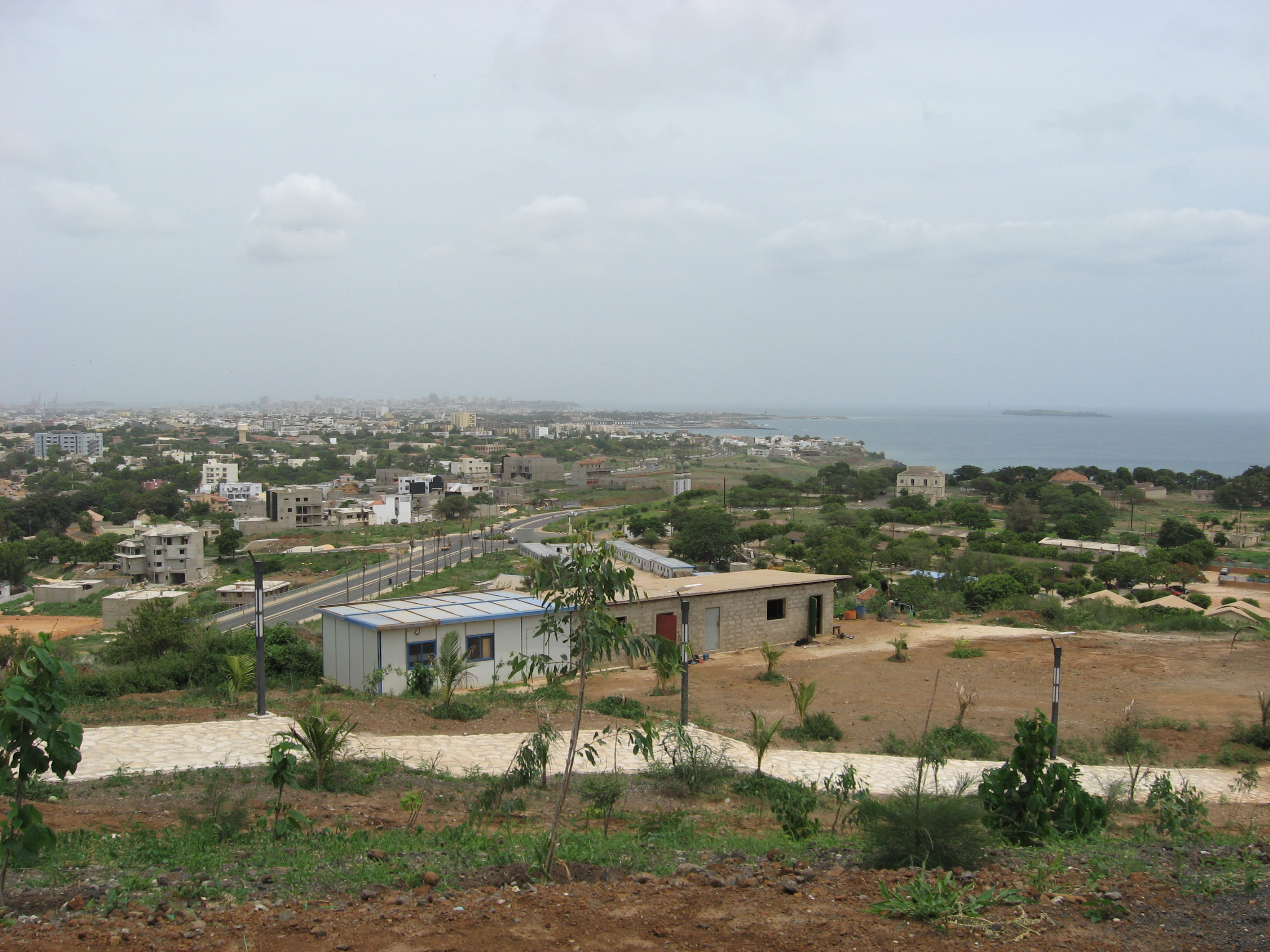 Monument de la Renaissance africaine : logements de chantier nord-coréens